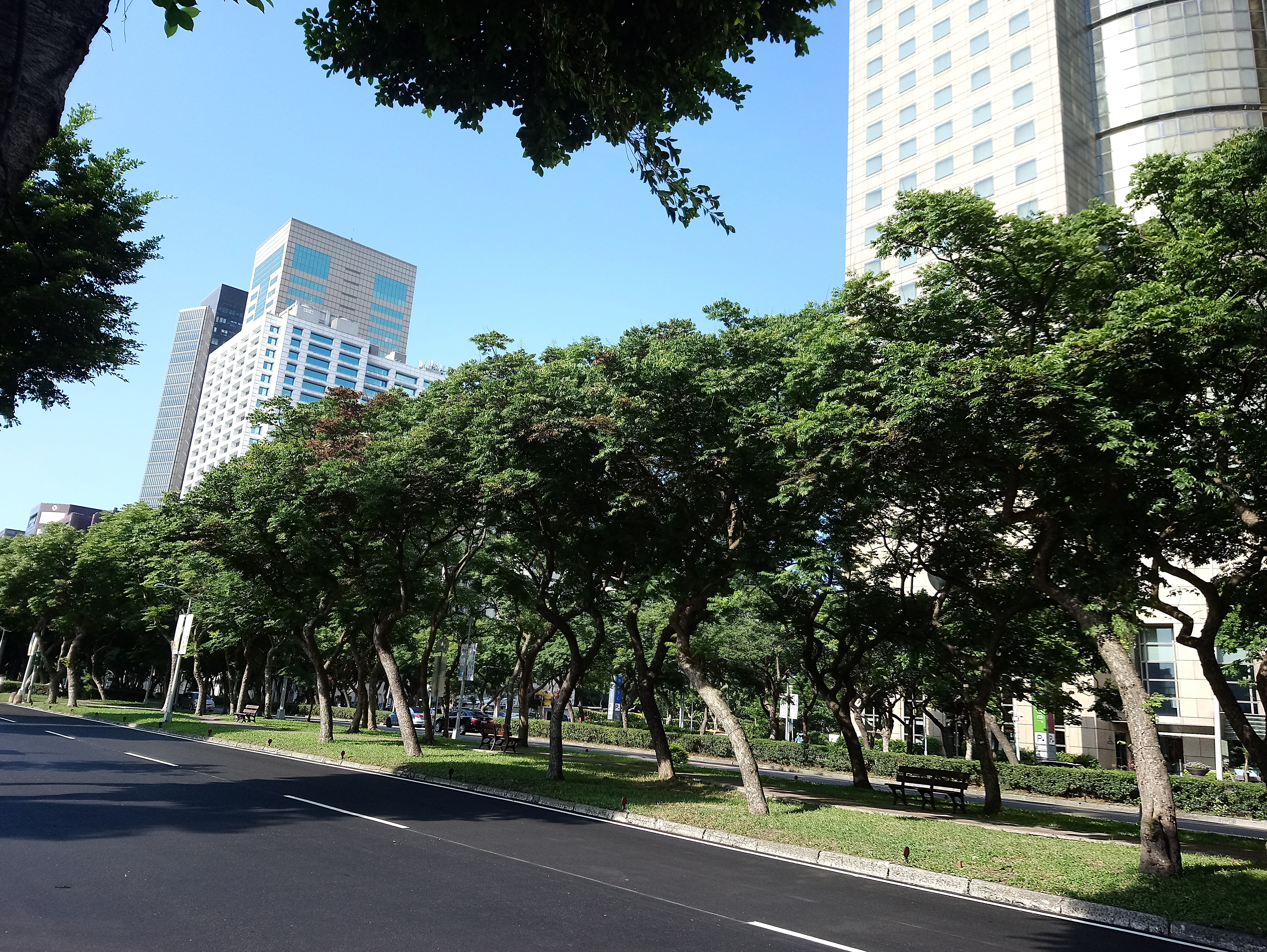 敦化南路路中分隔島上的臺灣欒樹,臺北市大安區臥龍次分區群賢里